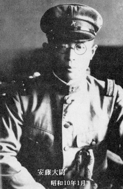 Il capitano T. Ando, partecipante alla sommossa militare del 26 febbraio 1936 a Tokyo